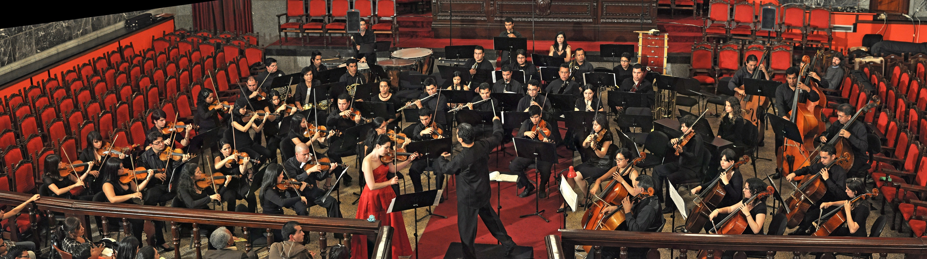 Panoramica dell'Orchestra Sinfonica dello Stato Mérida